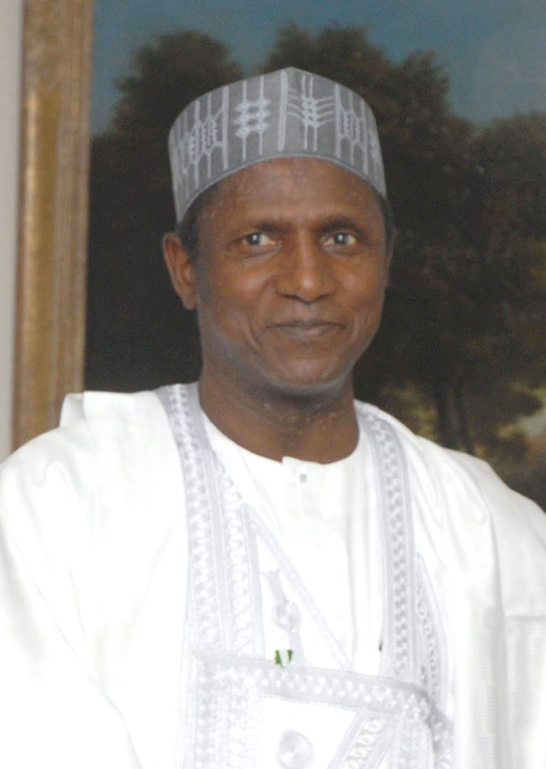 Umaru Yar'Adua - 13. prezydent Nigerii.